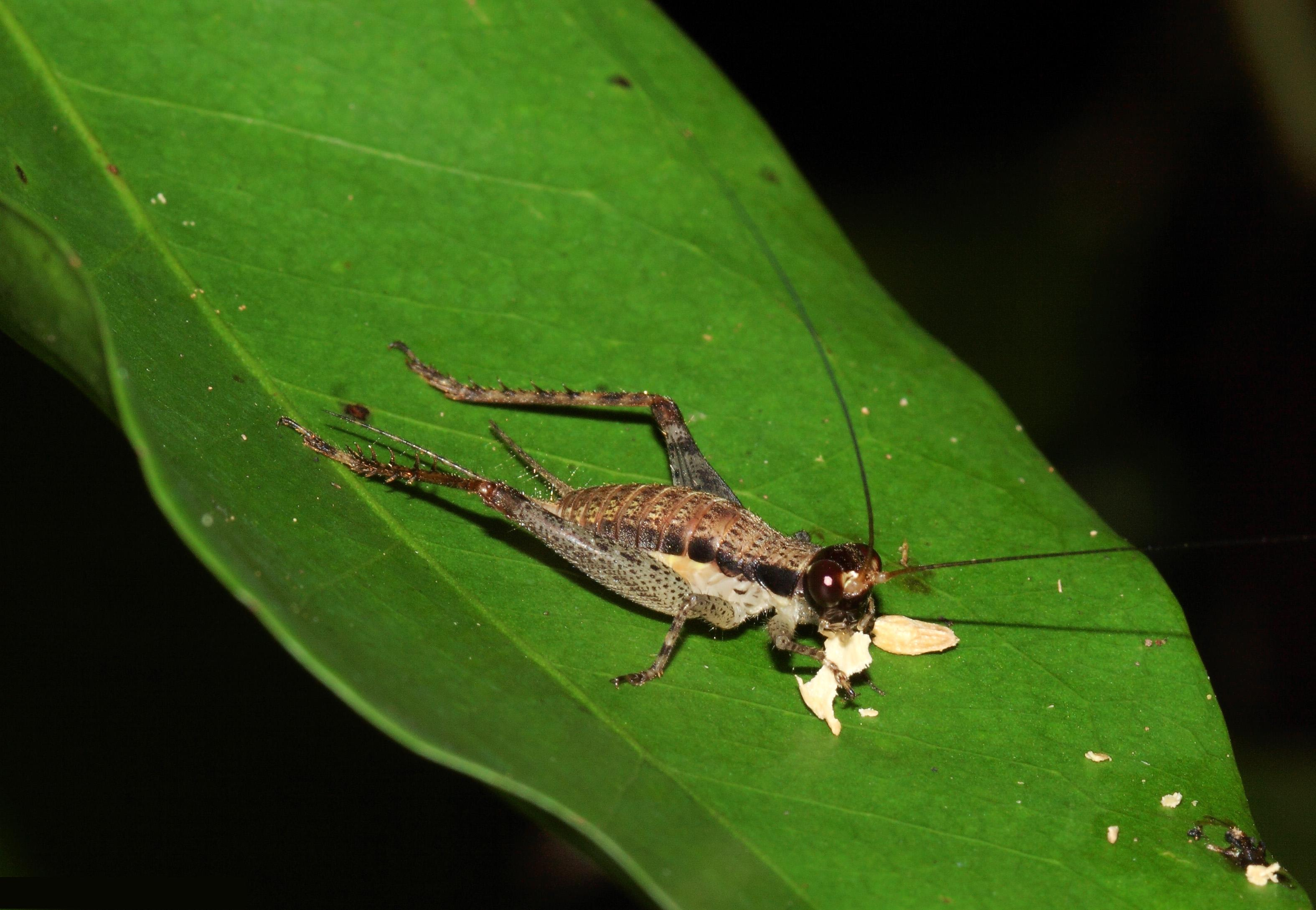 Cardiodactylus faj lárvája